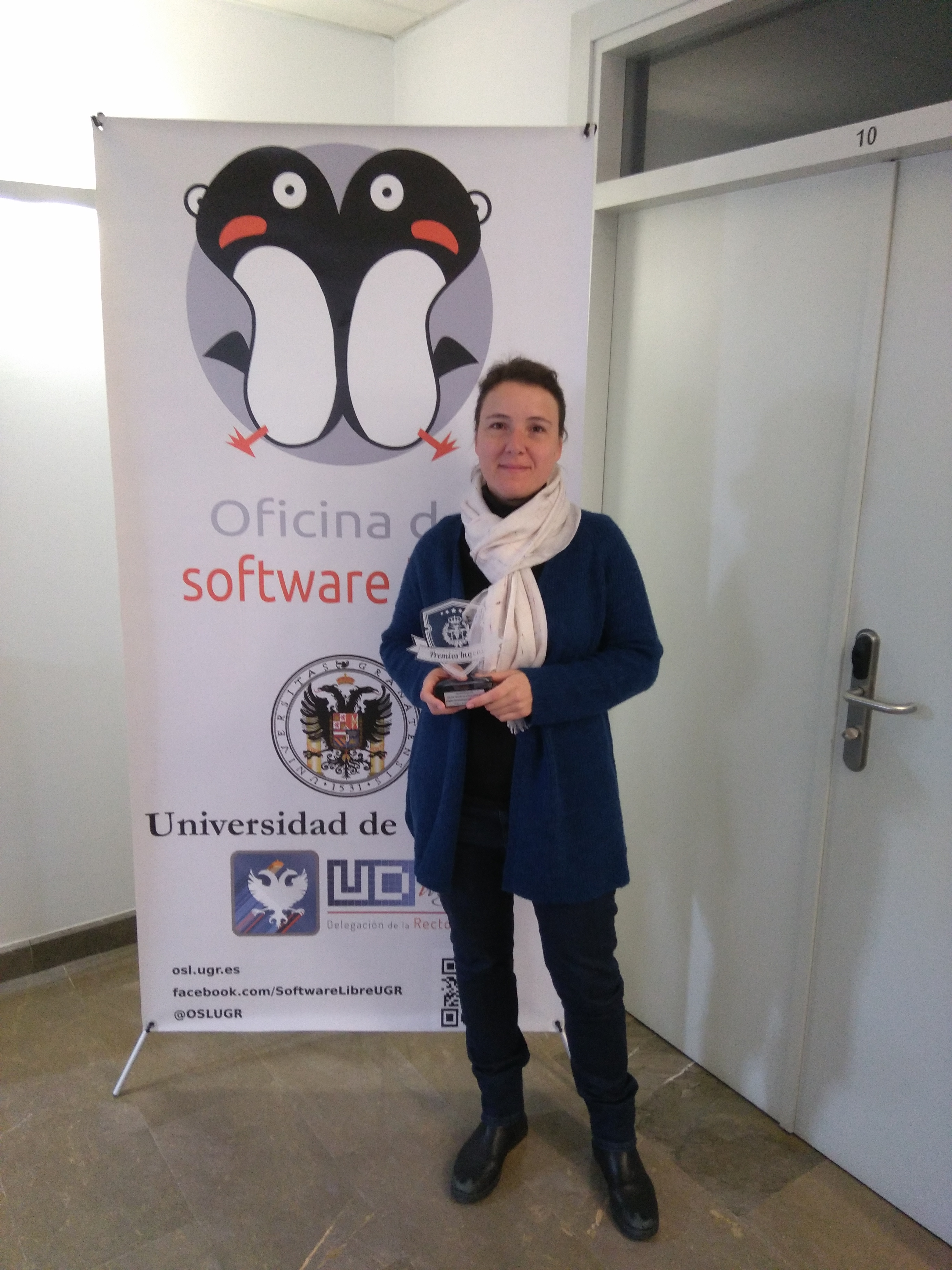 Premios Ingenio al Campus Tecnológico Ugr para Chicas